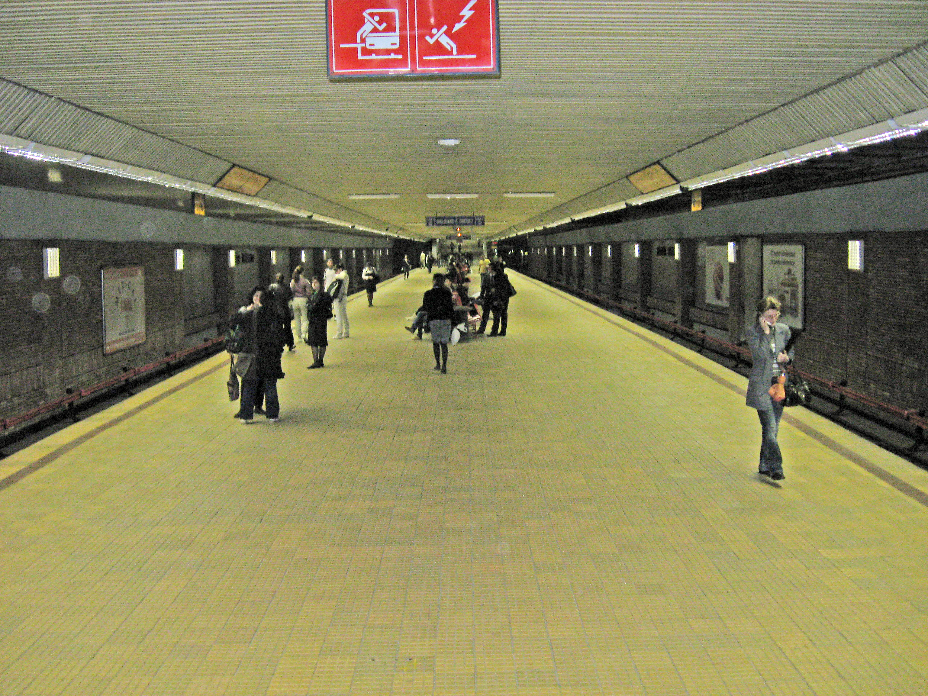 Station Piața Muncii du métro de Bucarest.